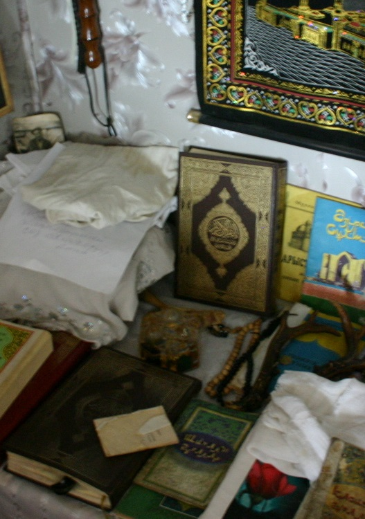 Несколько экземпляров Корана в переводе на казахский язык Халиф Алтая.